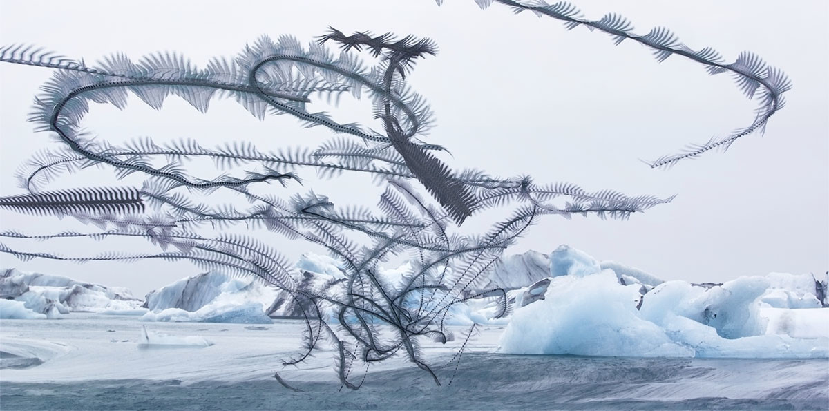 Obra ornitogràfica de Xavi Bou